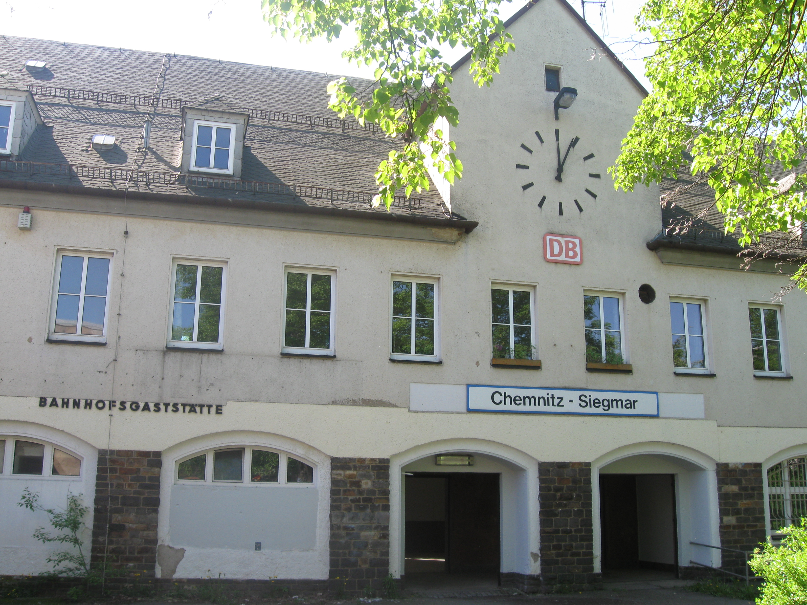 Bahnhof Chemnitz-Siegmar mit Eingang zu den Bahnsteigen.